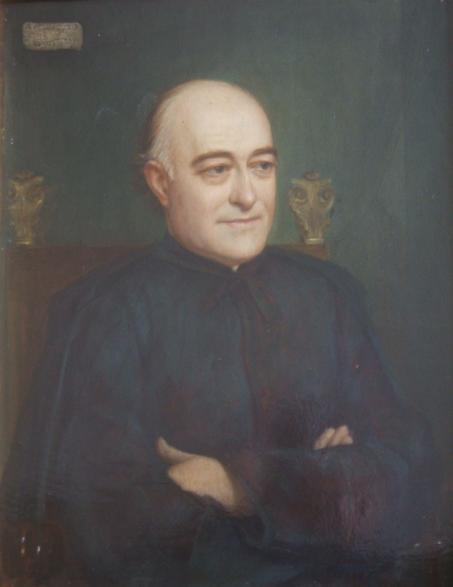 L'historien, archéologue et académicien français Louis Duchesne (1843-1922), huile sur bois du comte Napoleone Parisani, daté MCM, collection Marie-Anne Miniac, Rennes, France.